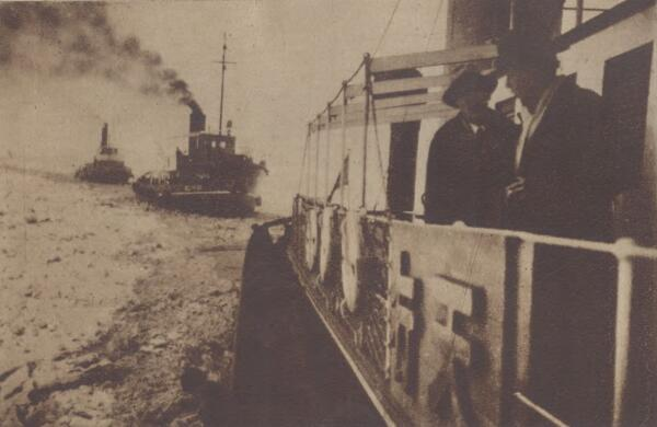 题名： 春行冬令：大沽口封凍阻航：撞冰輪之一天行號前赴大沽口營救各輪，圖見撞冰工作之進行情形：[照片] 文献来源： 《良友》 出版时间： 1936 年 卷期(页)： [ 第115期 ，18页 ] 中图分类号： C55